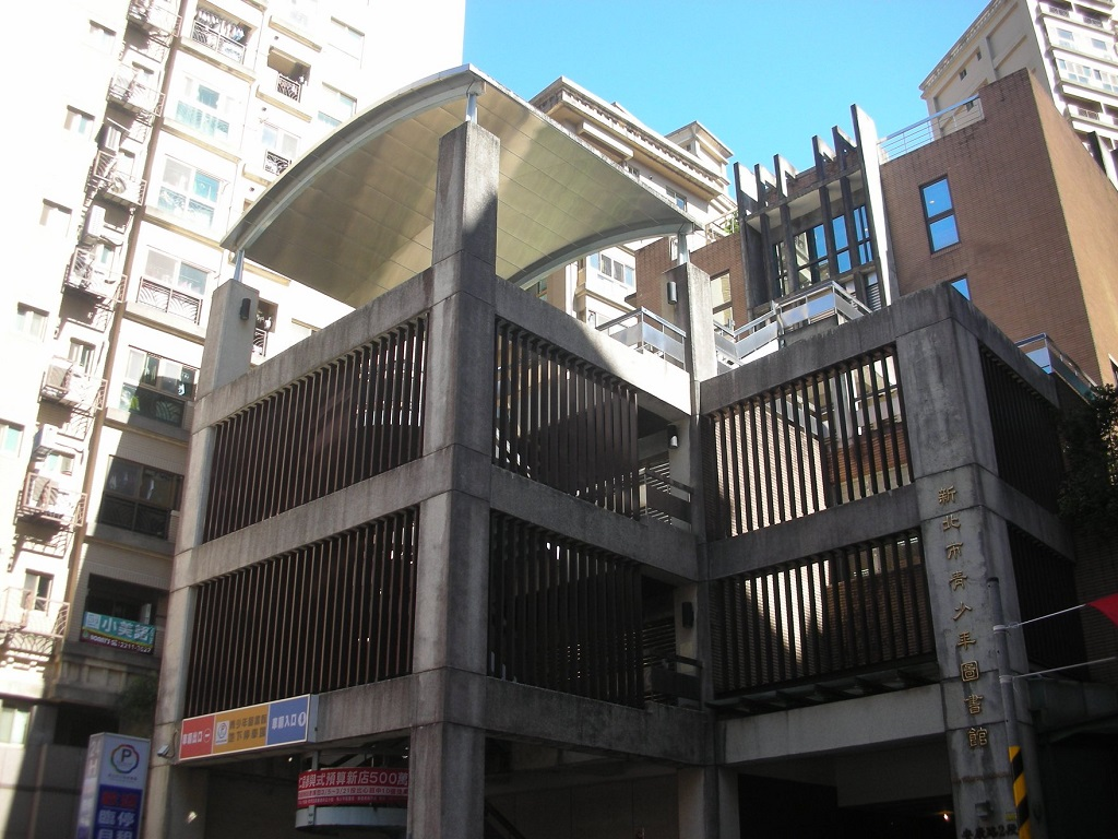 中文（台灣）: 新北市青少年圖書館，地址：新北市新店區安康路二段151號。